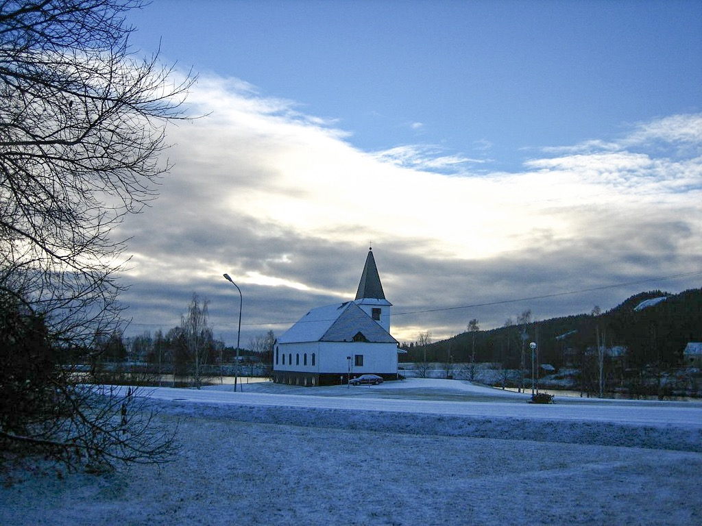 Original description by photographer at Flickr: NL: "De kerk van Vuollerim gezien vanuit mijn tuin in het licht van de opkomende zon" SE: "Vuollerims kyrkan"